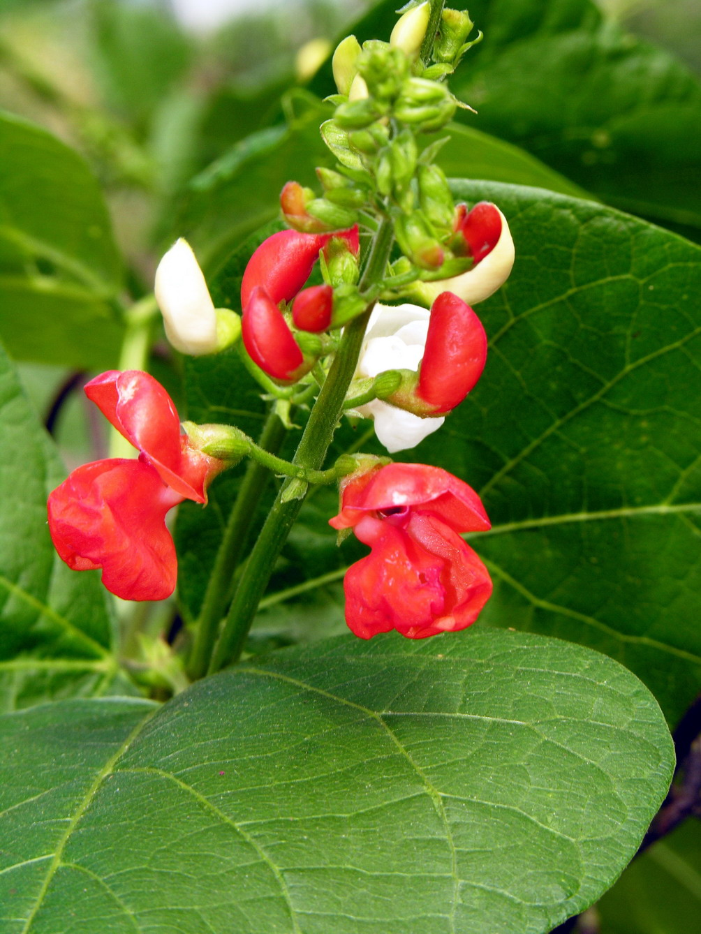 Raudonžiedė pupelė (Phaseolus coccineus) Šeima. Pupiniai (Fabaceae) Foto: Algirdas, 2006 m. liepos 16 d., Lietuva